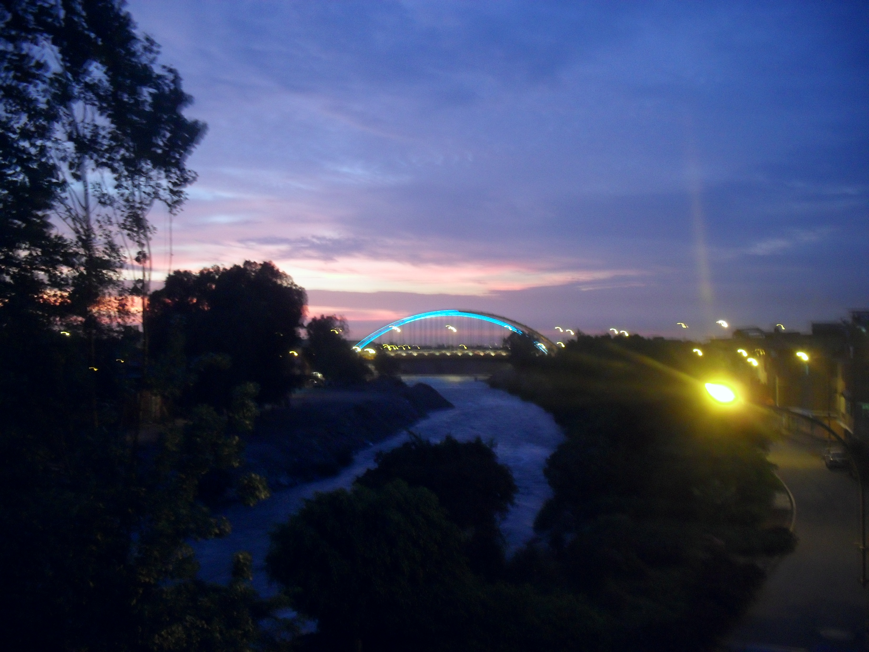 Atardecer de verano con el río Rímac en el distrito del Rímac